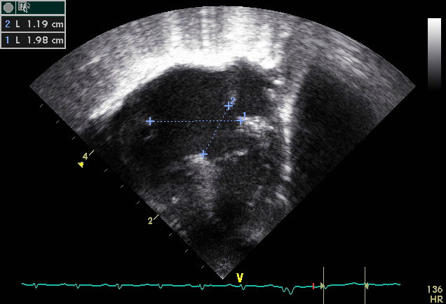 Eit ekkokardiogram av eit hjarte med atrioventrikulær septumdefekt. Eg, Kjetil Lenes har gjort opptaket og gjer det offentleg med godkjenning av arbeidsgjevaren min.